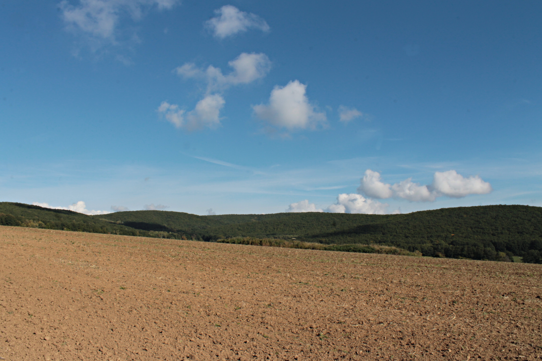 Přírodní park Baba pohled z cesty nad prachárnou směrem k Velké Babě